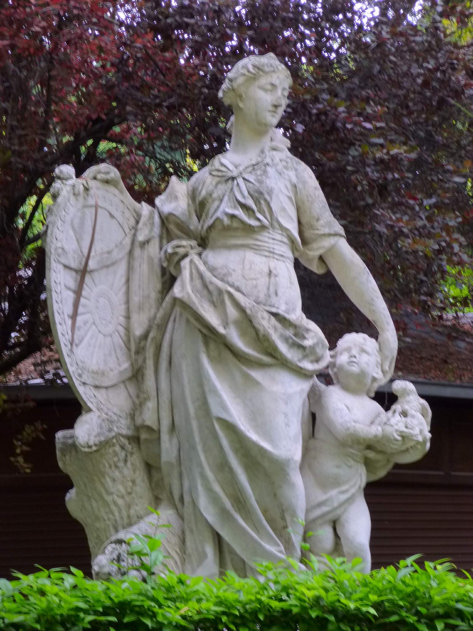 Estatua de la MariBlanca, antes fuente en la Plaza del Castillo. Alegoría de la Abundancia. Parque de la Taconera (Pamplona)